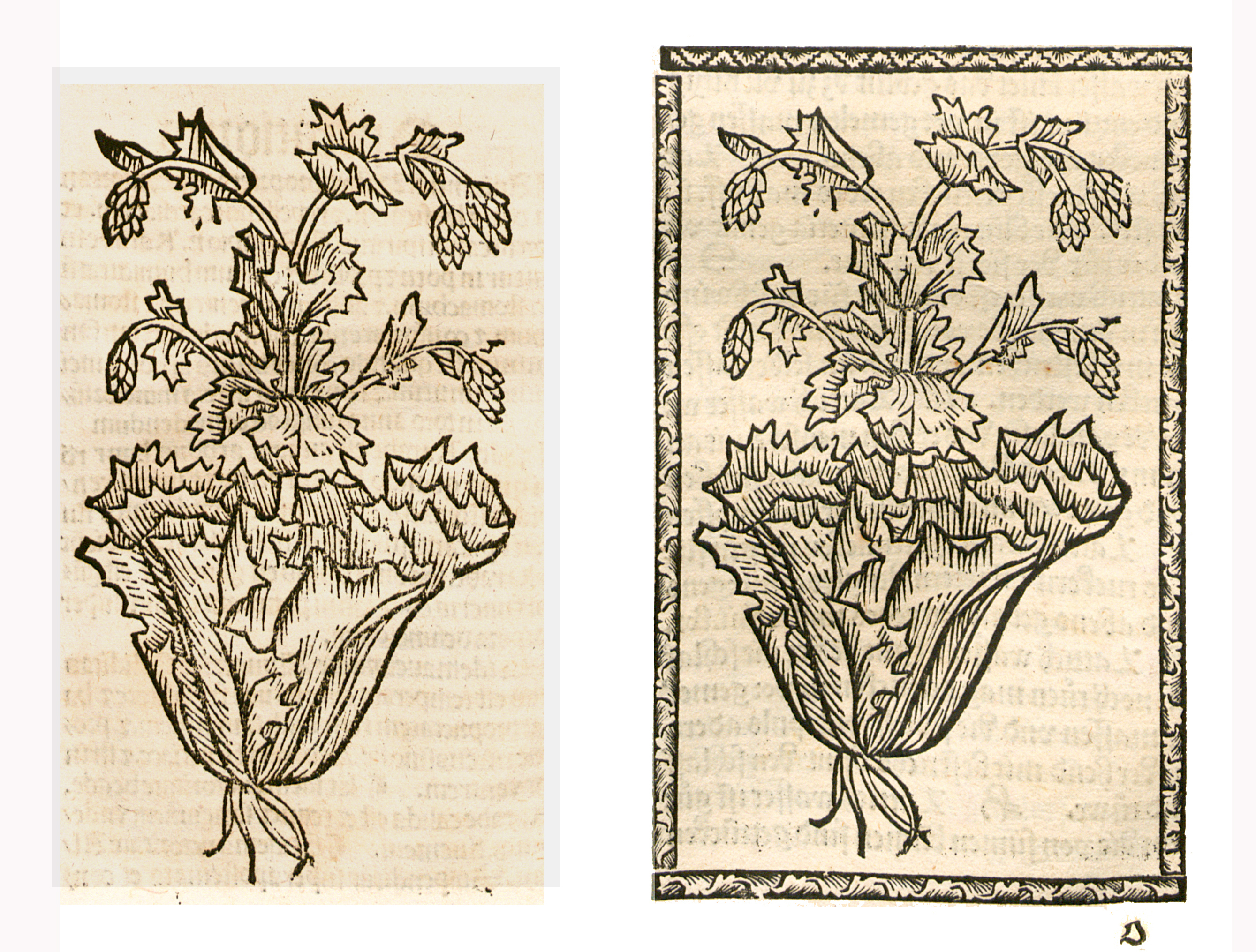 Abbildung von: Lattich (Lactuca sativa)